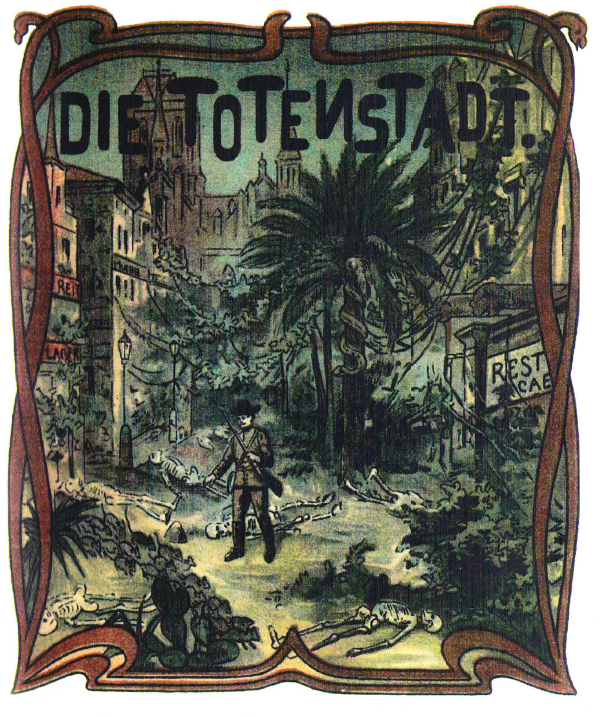 Die Totenstadt. Titelbild des Heftromans.